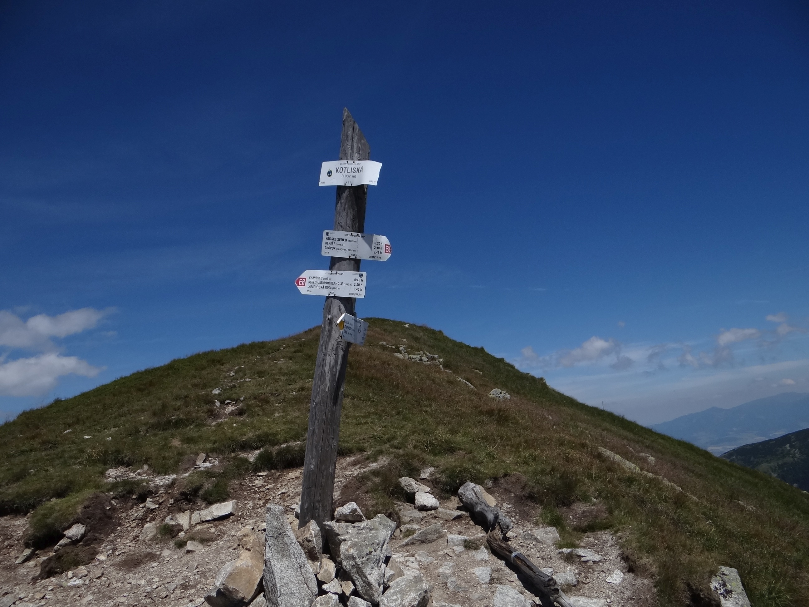 Kotliská